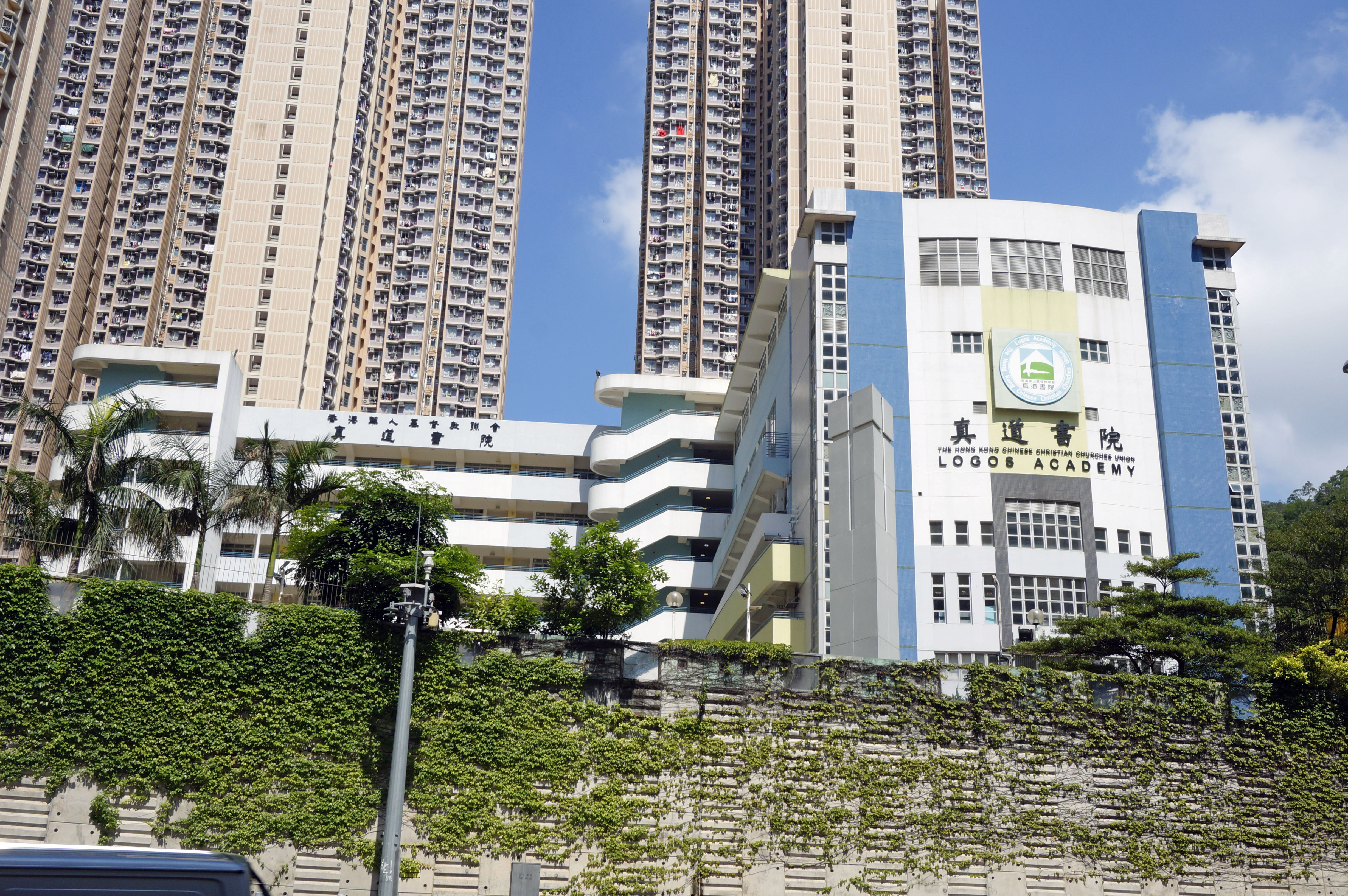 真道書院小學部外貌